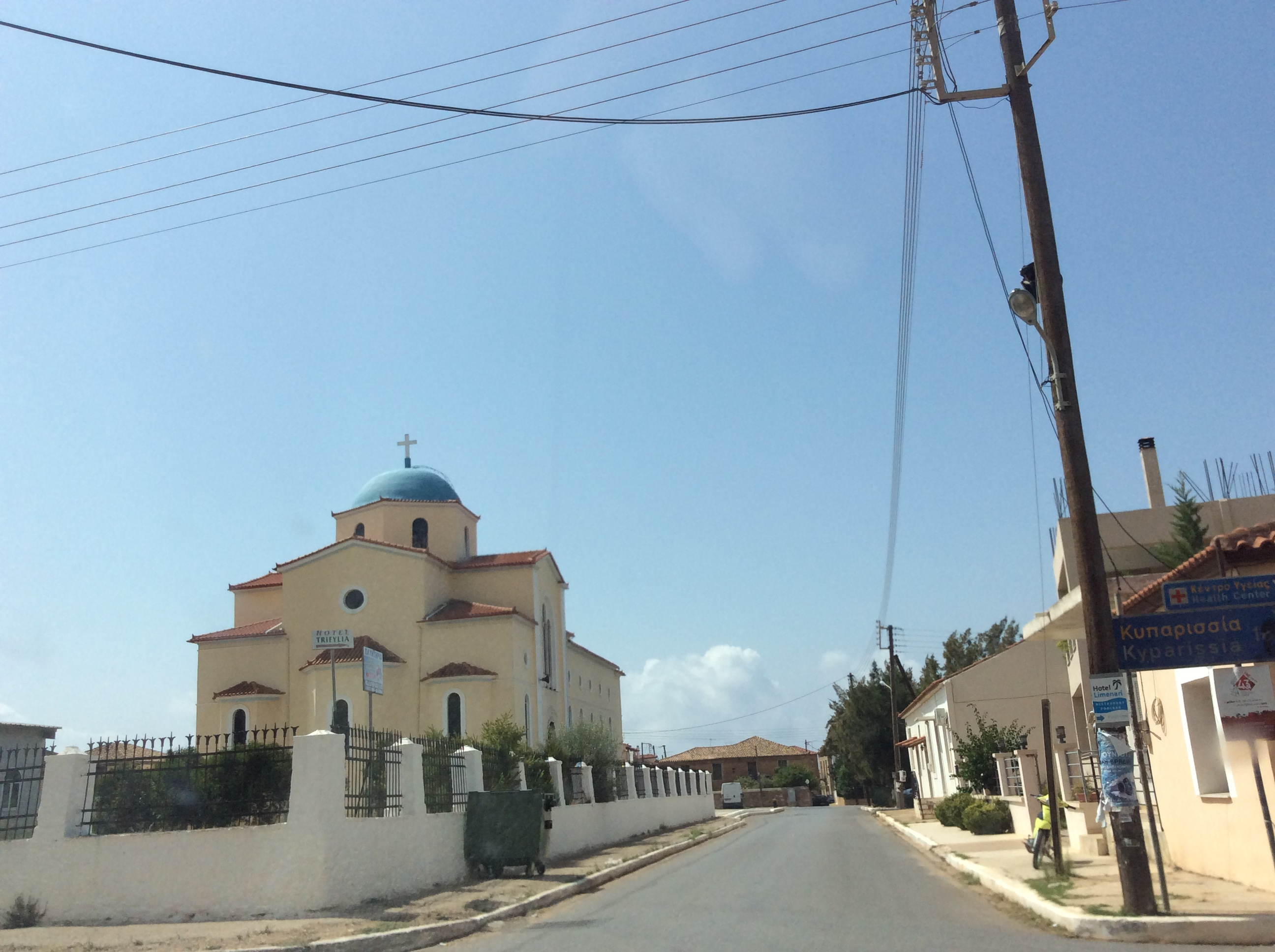 Φιλιατρά Μεσσηνίας. Ο Ιερός Ναός του Αγίου Χαραλάμπους.